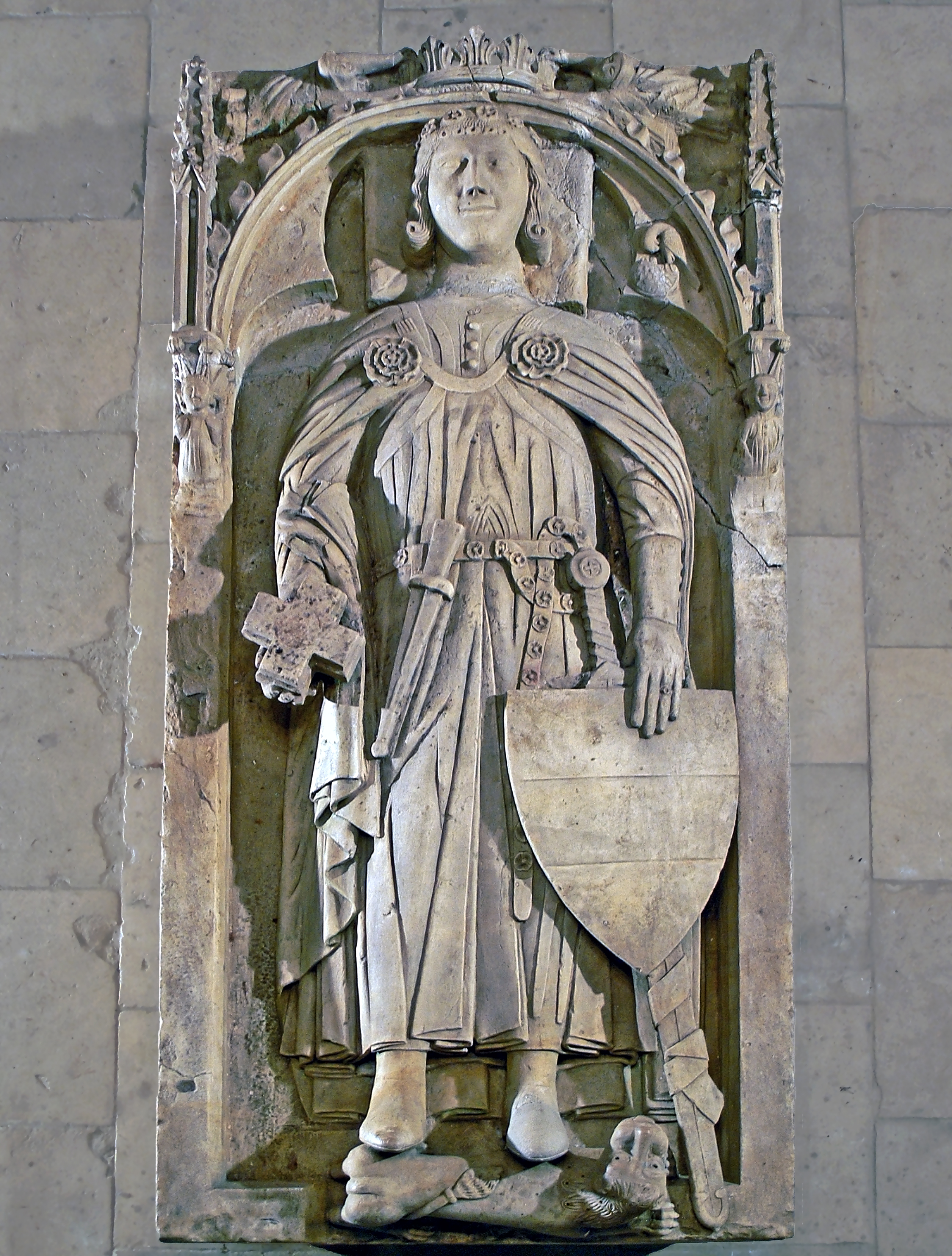 Ursprüngliche Deckplatte vom Grab des Hl. Gottfried von Cappenberg (Stiftskirche Cappenberg, südliches Querhaus)